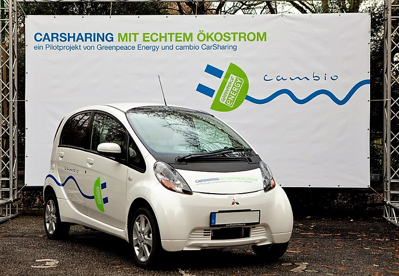 Das erste reine eMobil, ab 2011 in der cambio-Flotte